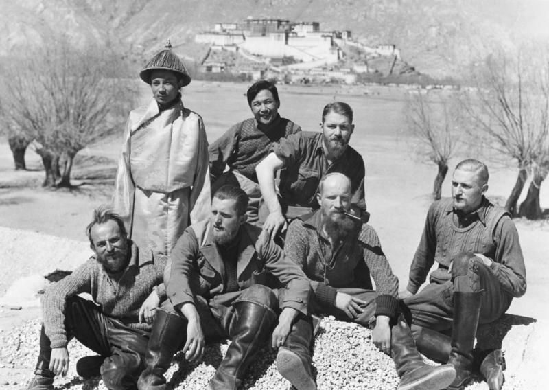 Tibetexpediton, Expeditionsteilnehmer Lhasa, Expeditionsgruppenaufnahme mit Potala im Hintergrund [Von links nach rechts: (stehend) Rabden Khazi, Kaiser Bahadur Thapa, Schäfer; (sitzend) Krause, Geer, Wienert, Beger] Abgebildete Personen: Beger, Bruno Dr.: SS-Hauptsturmführer, Abteilungsleiter Sven-Hedin-Institut, Deutschland (GND 128720654) Schäfer, Ernst Dr.: SS-Sturmbannführer, Leiter des Sven-Hedin-Institutes, Deutschland (GND 123991420) Krause, Ernst: Mitarbeiter im Sven-Hedin-Institut, Deutschland